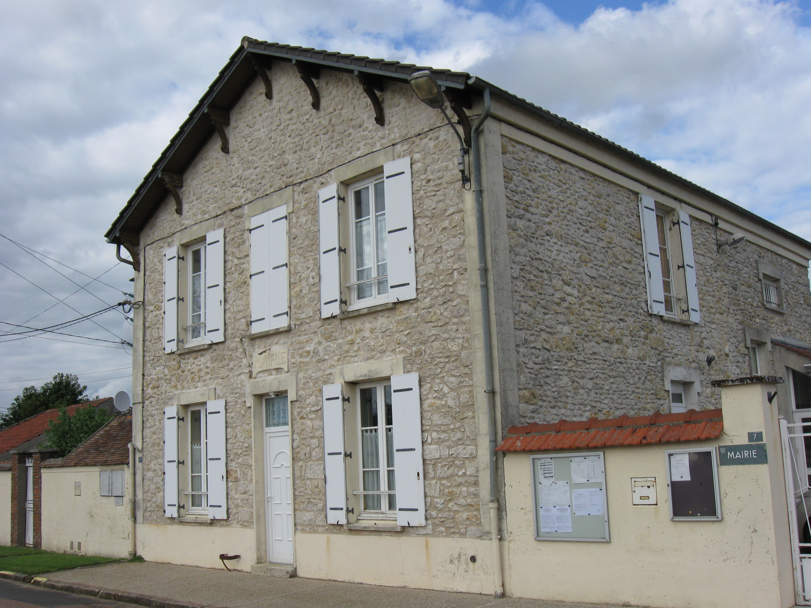 Mairie de Garentreville. (département de la Seine et Marne, région Île-de-France).